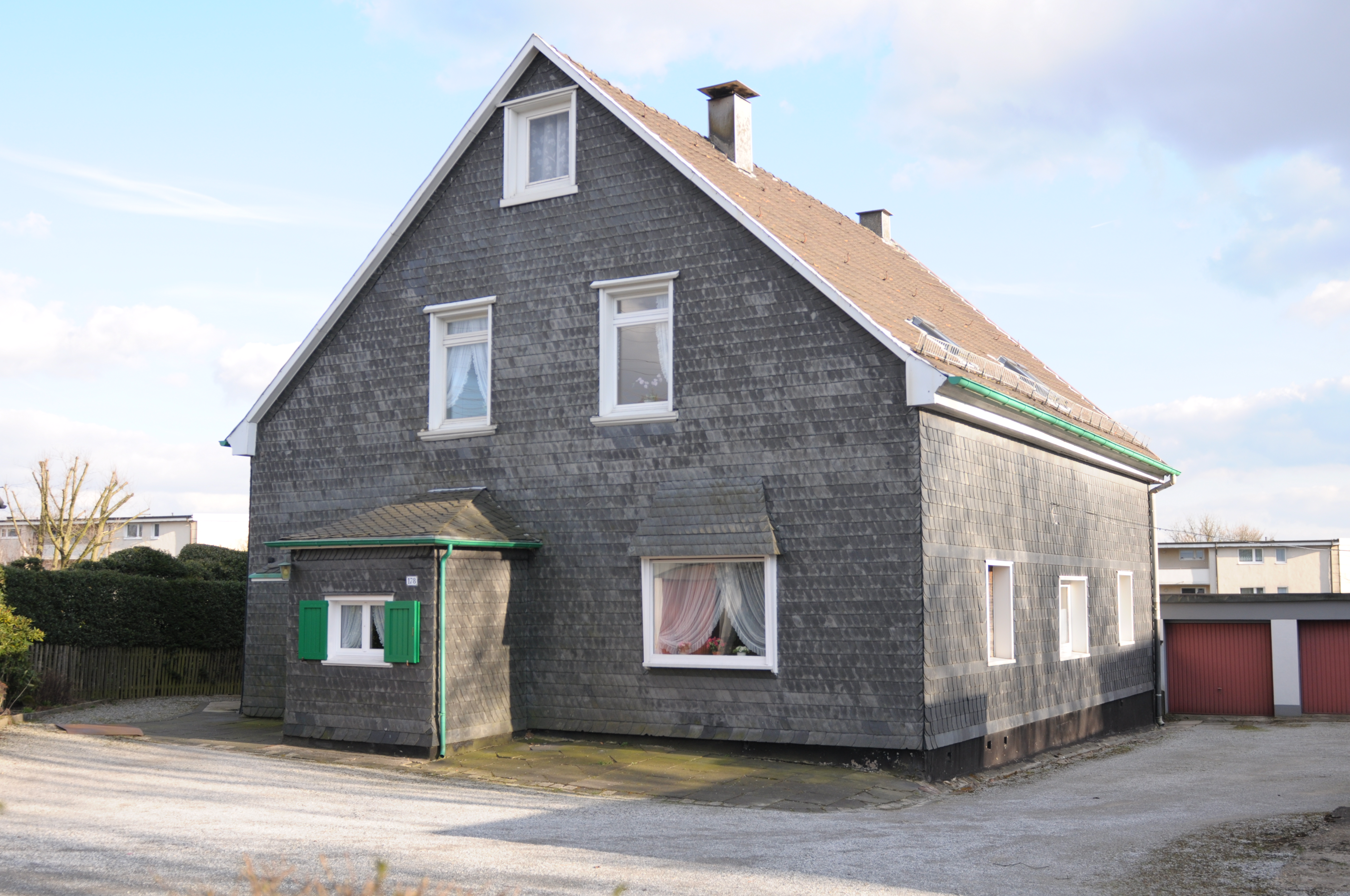 Westfalenweg 178, Wuppertal